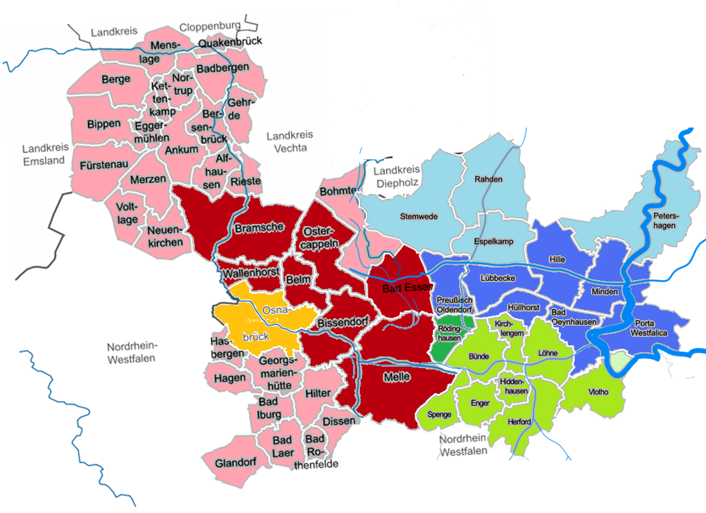 Wiehengebirgsgemeinden